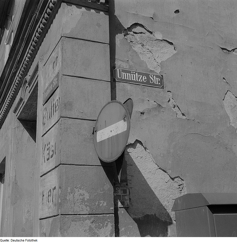 Original image description from the Deutsche Fotothek Stralsund. Straßenecke Frankenstraße Unnütze Straße